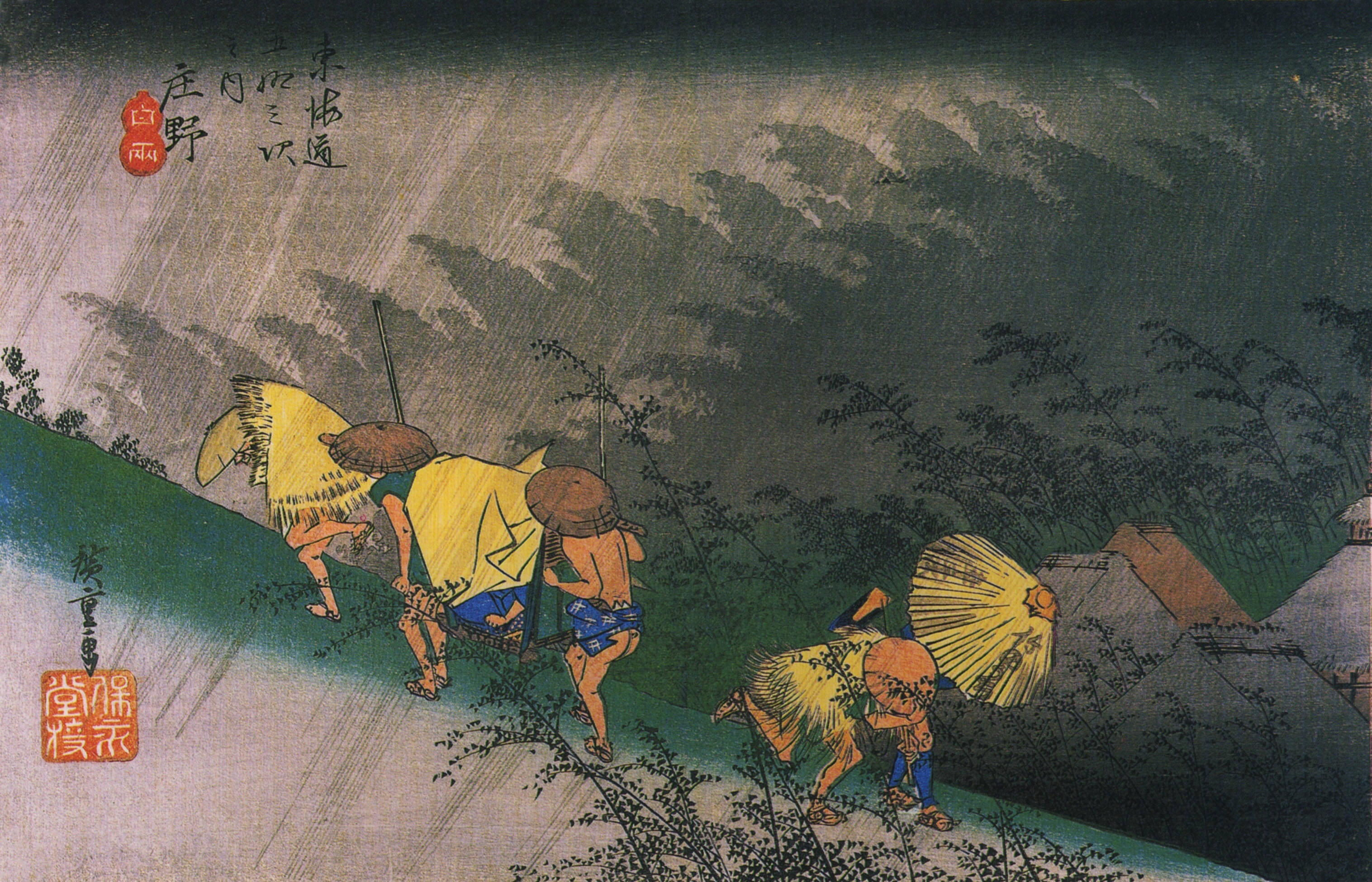 Hiroshige, Travellers surprised by sudden rain Hiroshige, voyageurs surpris par une averse soudaine